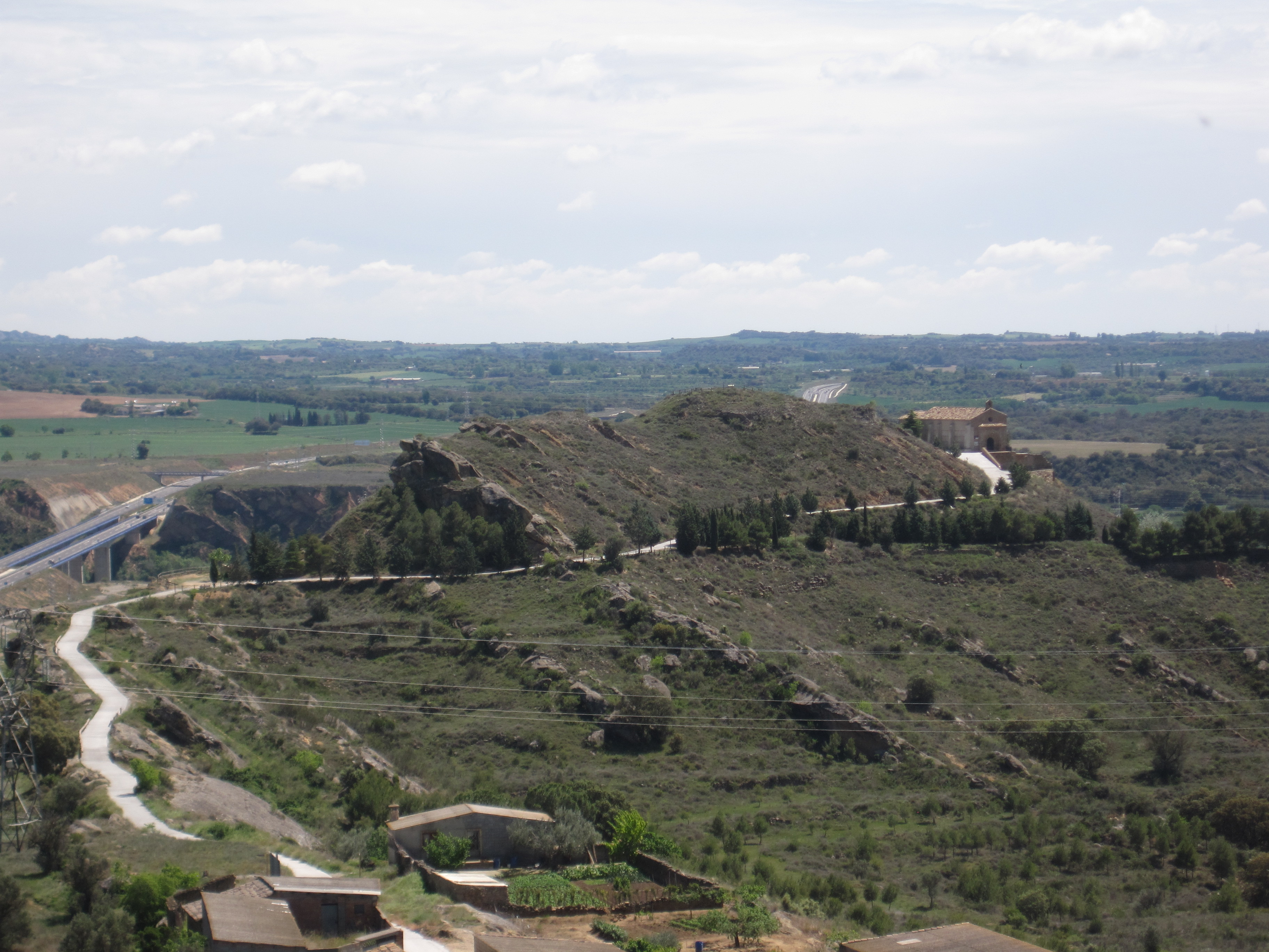 Aragonés: Armita d'a Virchen de la Bella, Castillón d'o Puent, Semontano de Balbastro, Aragón.